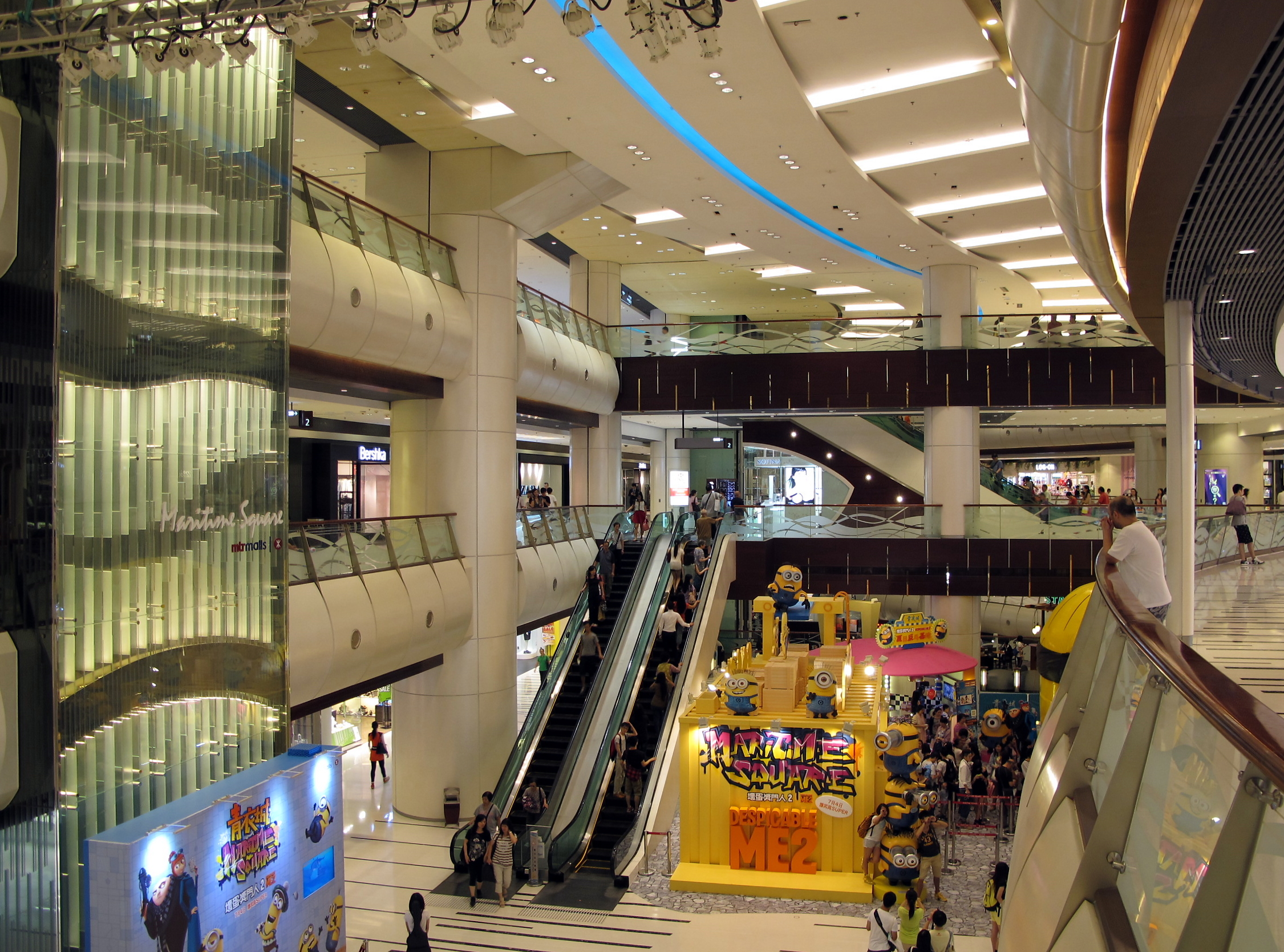 Maritime Square Void